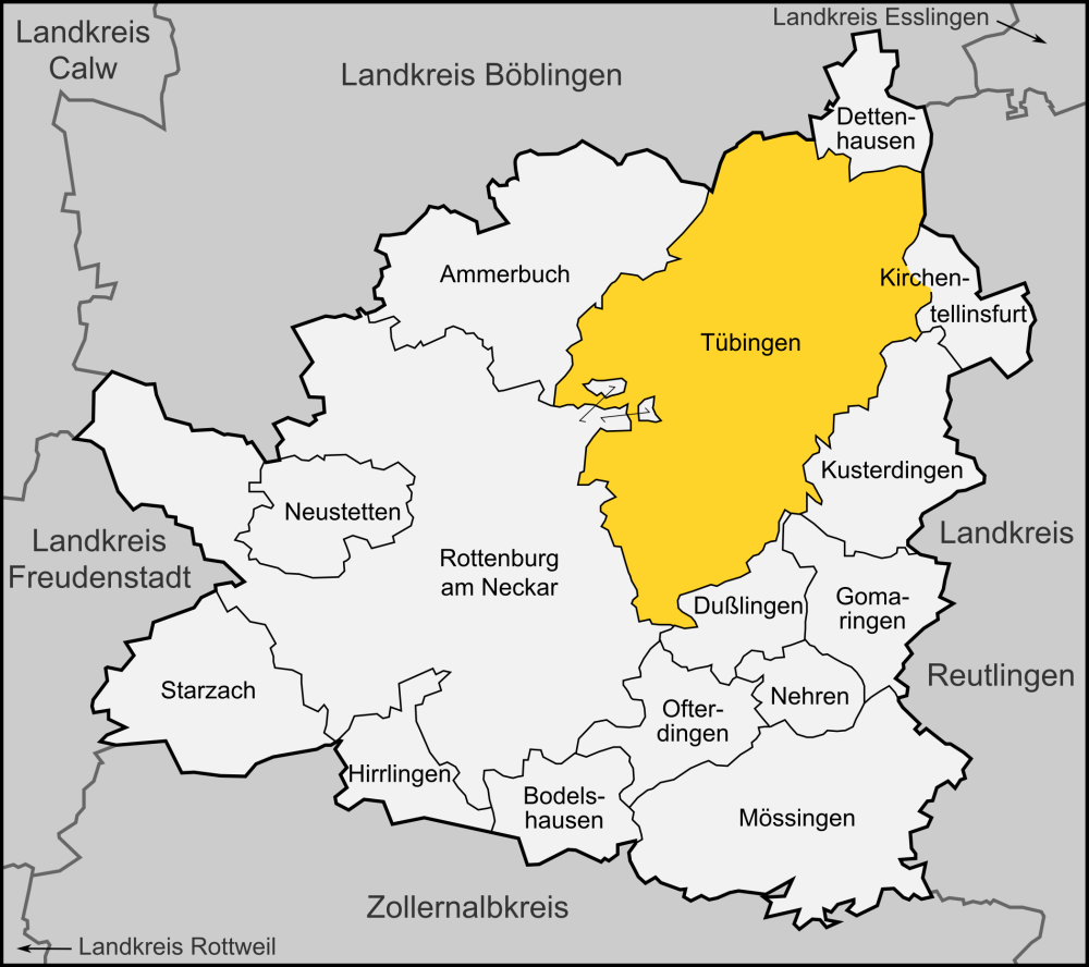 Karte der Stadt Tübingen im Landkreis Tübingen